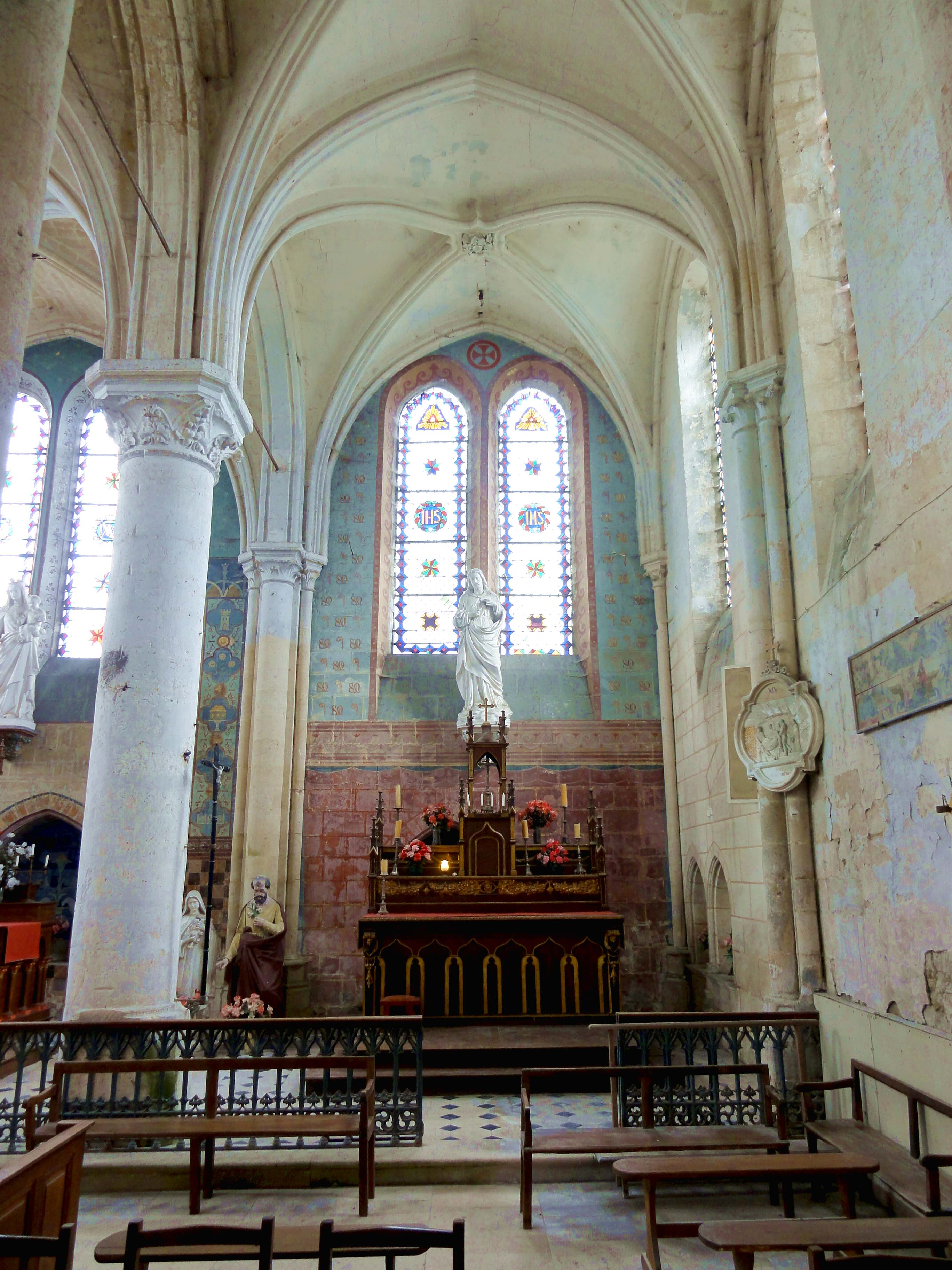 Intérieur de l'église - voir titre.